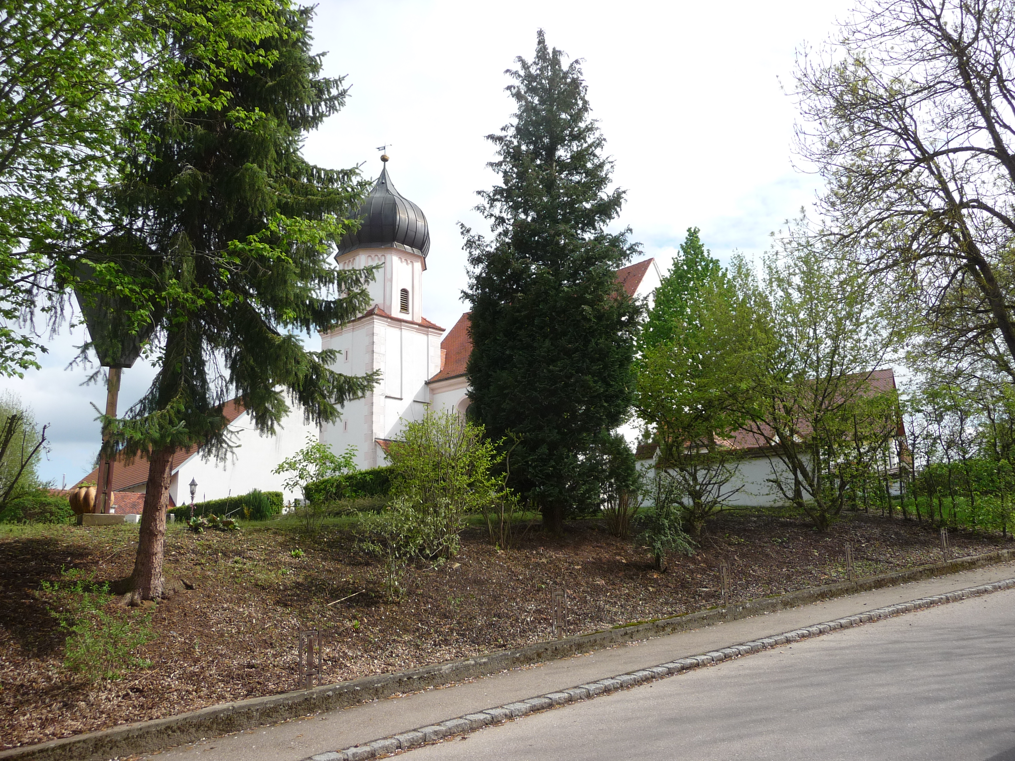 Die Kirche von Ortlfing als Dorfzentrum.